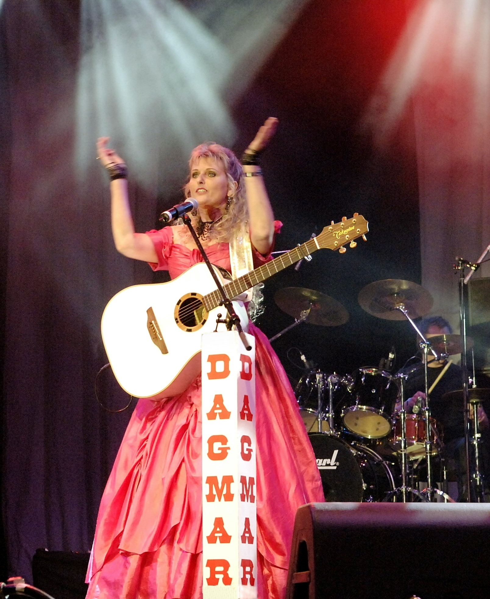 Dagmar Lay D. auf dem Festival in Schupfart/Schweiz